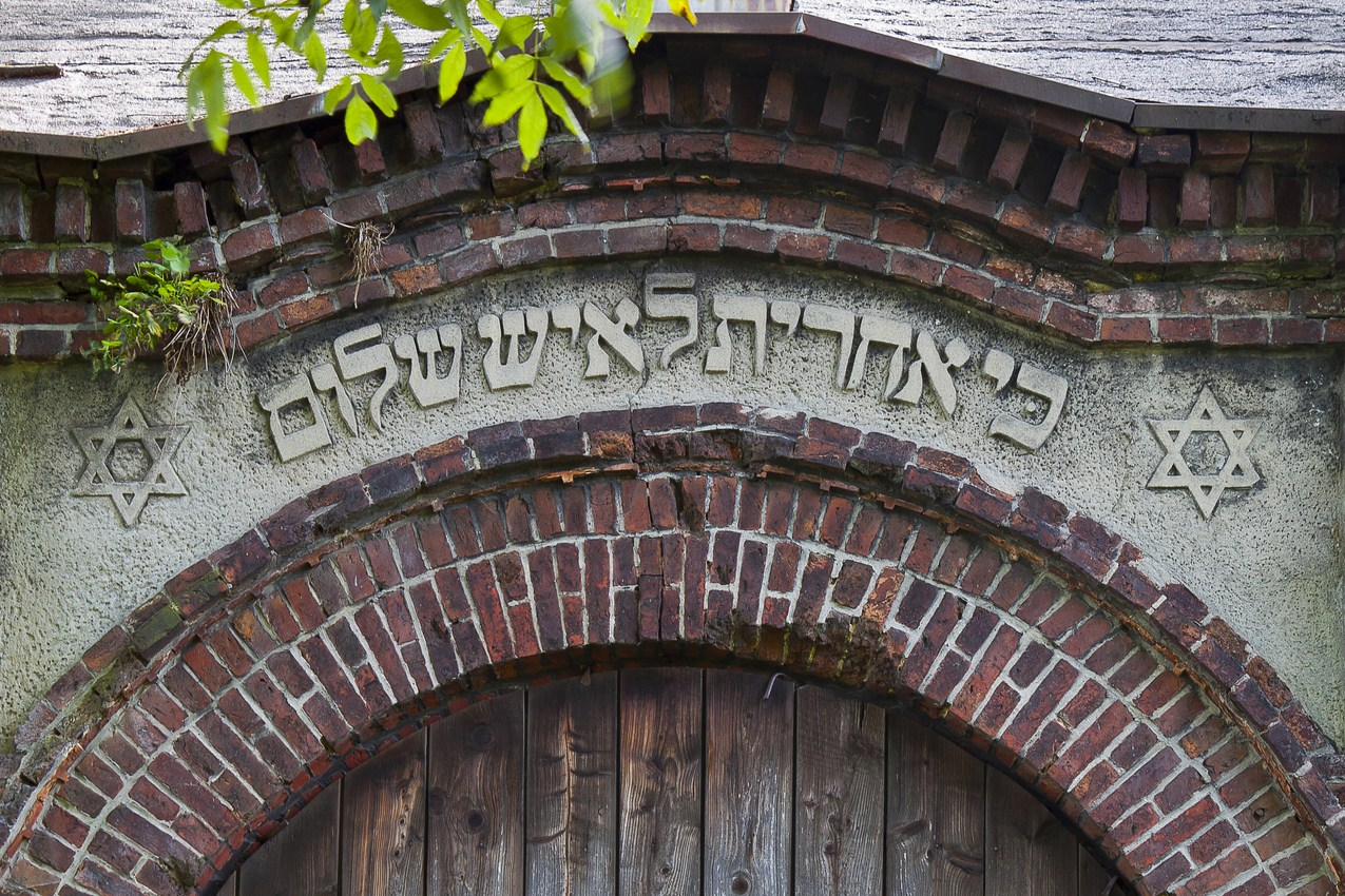 napis na domu przed pogrzebowym